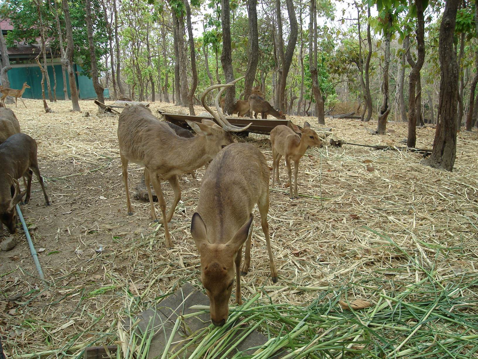 Deer(s) in Chiang Mai zoo